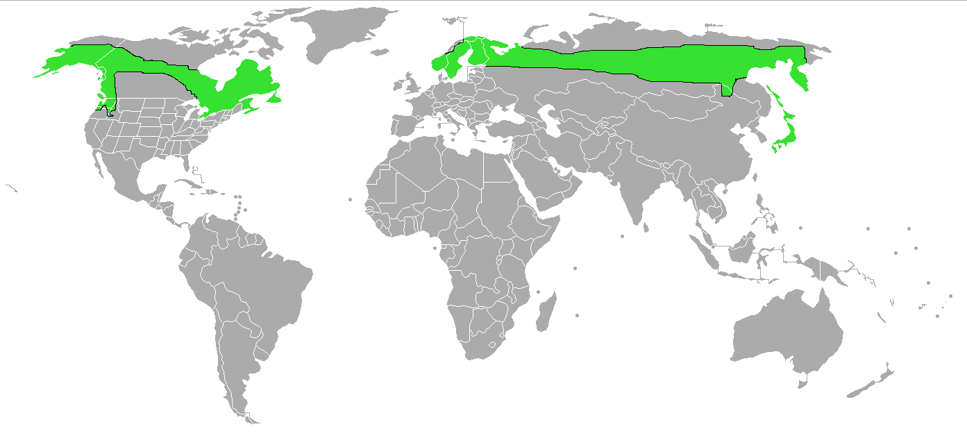 Pinicola enucleator